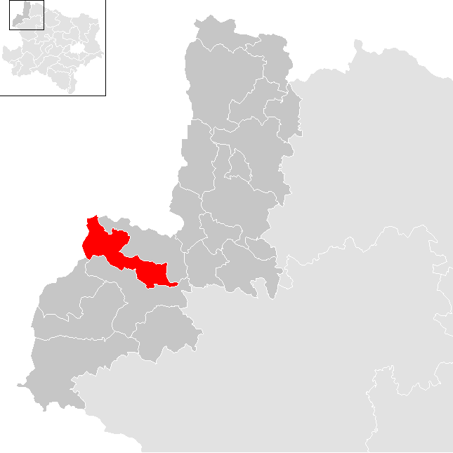 Bezirk Gmünd